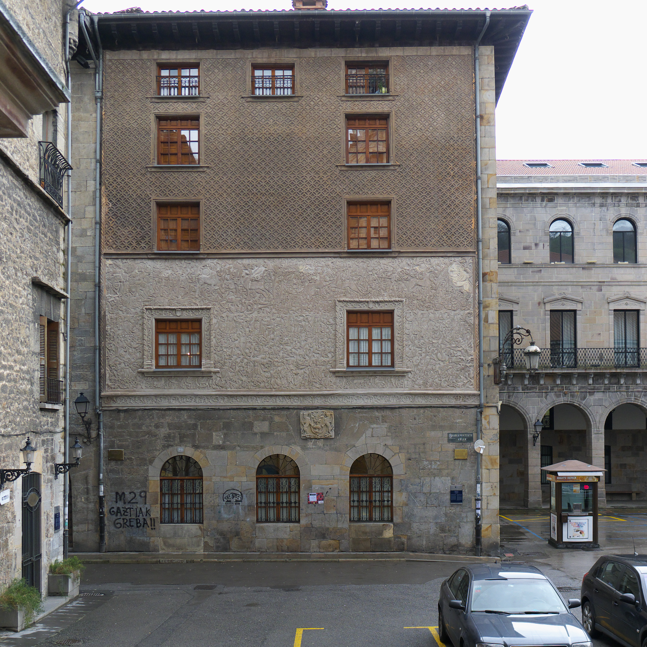 Una casa con orígenes en el siglo XVI. Presenta un original paño muy gravado con relieves decorativos de diversos motivos.